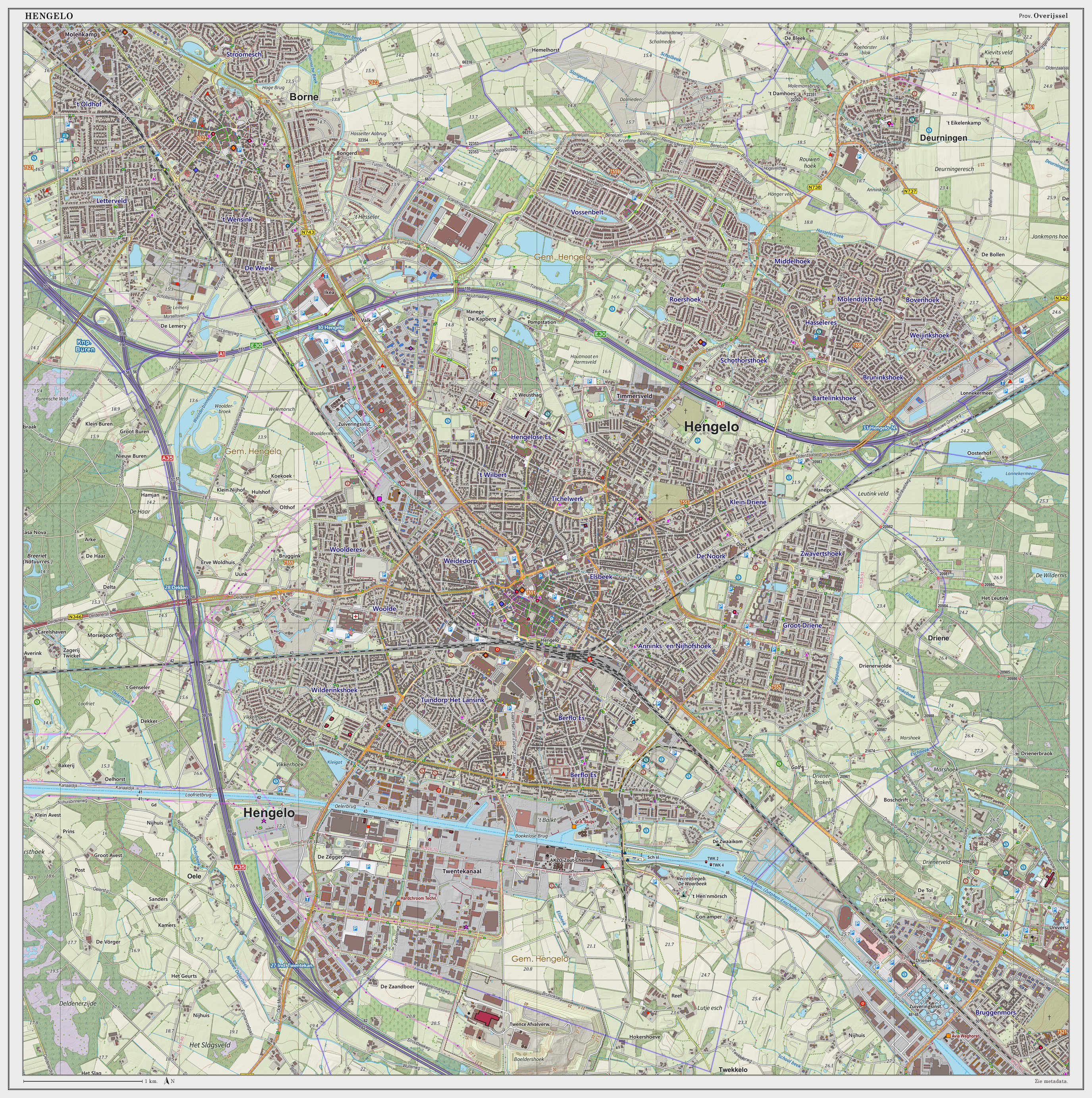 Topografische kaart van Hengelo (woonplaats). Resolutie: 300 pixels/km. Kaartbeeld samengesteld uit de open geodata van de Top10NL en Top25namen (Basisregistratie Topografie, Kadaster), Creative Commons BY licentie. Gebouwvlakken uit open geodata BAG extract. Wegen uit de OpenStreetMap. Schaduwreliëf uit de Actuele Hoogtekaart AHN2. Samenstelling en kleurenschema: Jan-Willem van Aalst, met QGIS2. Zie ook de Legenda.